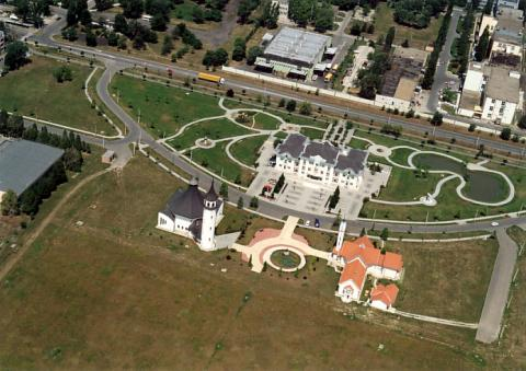 Martfű - castle, Hungary, aerialphotography. Bal oldalon a Szent Tamás apostol római katolikus templom, jobbra a református templom